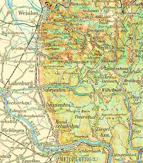 Landkarte (1913) der Heidelberger Granit-Region (Odenwald)